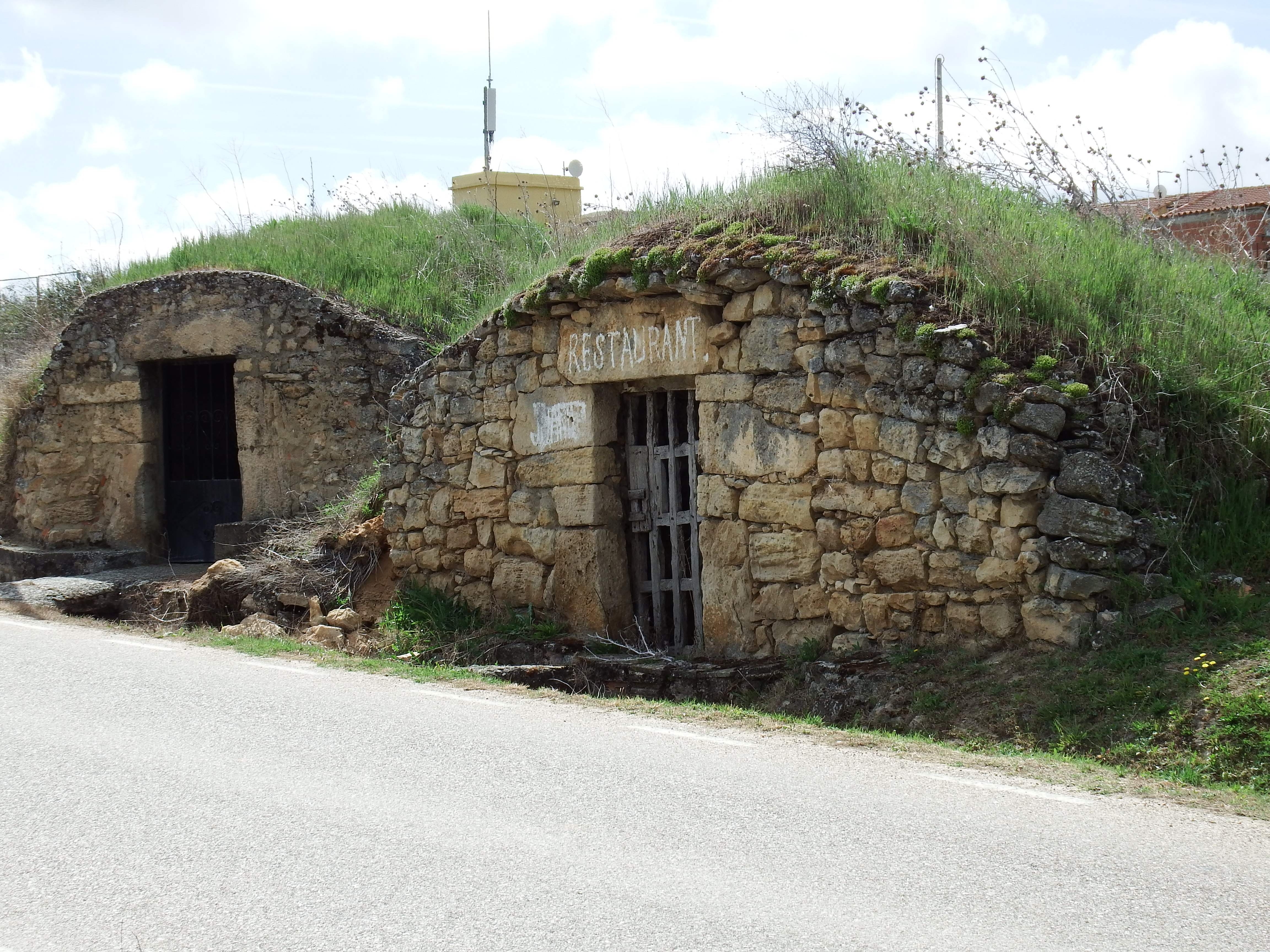 Bodegas en Villanueva de Gumiel